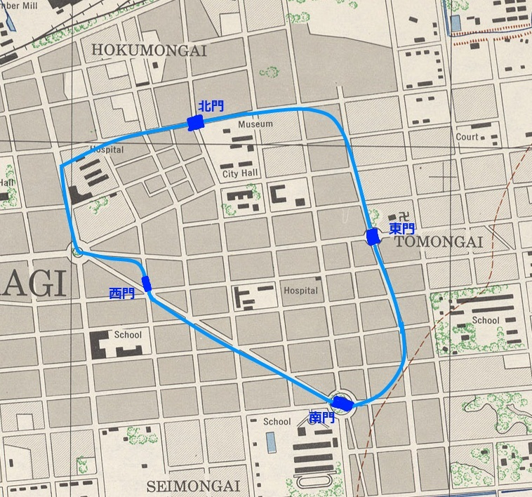 嘉義縣城。參考嘉義市史蹟資料館的展示圖 （位於第一區「都市發展」裡頭）所繪